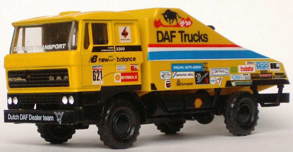 Lion Toys model van een DAF 3300, bijgenaamd "The Bull". Dit was het tweede jaar dat Jan de Rooy aan Parijs-Dakar meedeed met een 2-motorige truck. Hij zou hier zijn 2e overwinning in vieren. Categorie:Afbeelding modelbouw